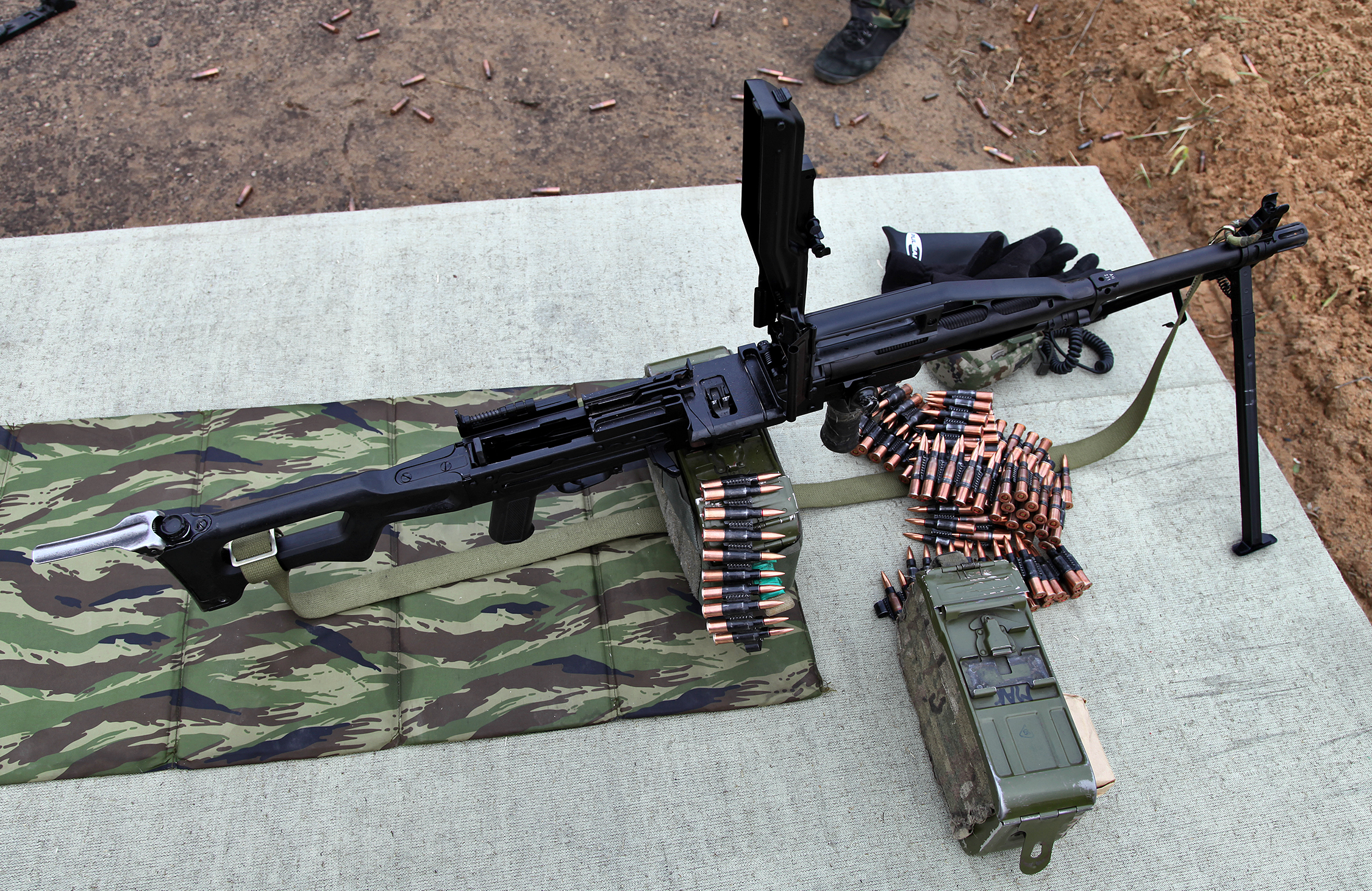 ПКП Печенег (PKP Pecheneg machine gun)